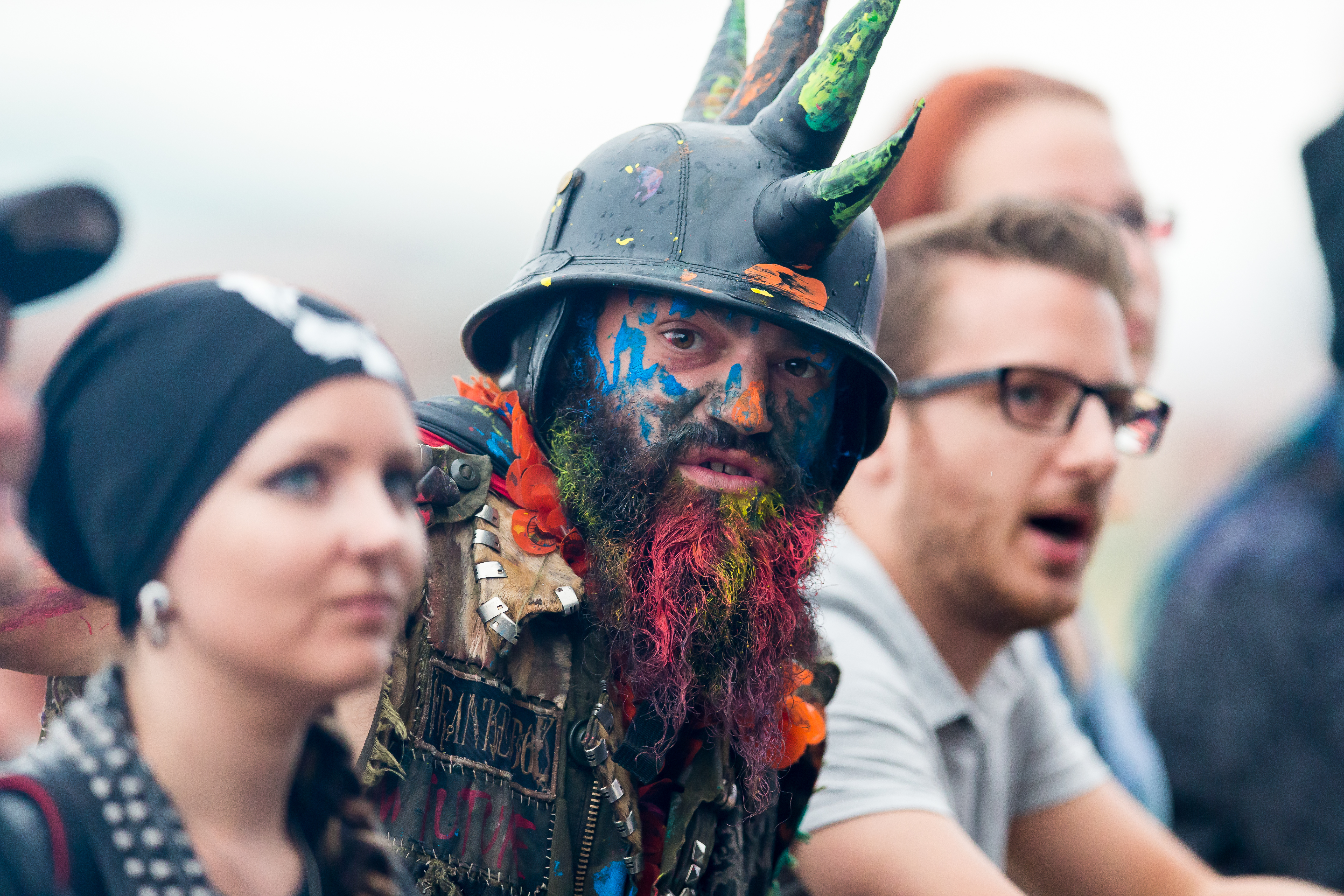 Festivalgelände during Summer Breeze 2016 at , Dinkelsbühl, Bayern, Germany on 2016-08-20, Photo: Sven Mandel